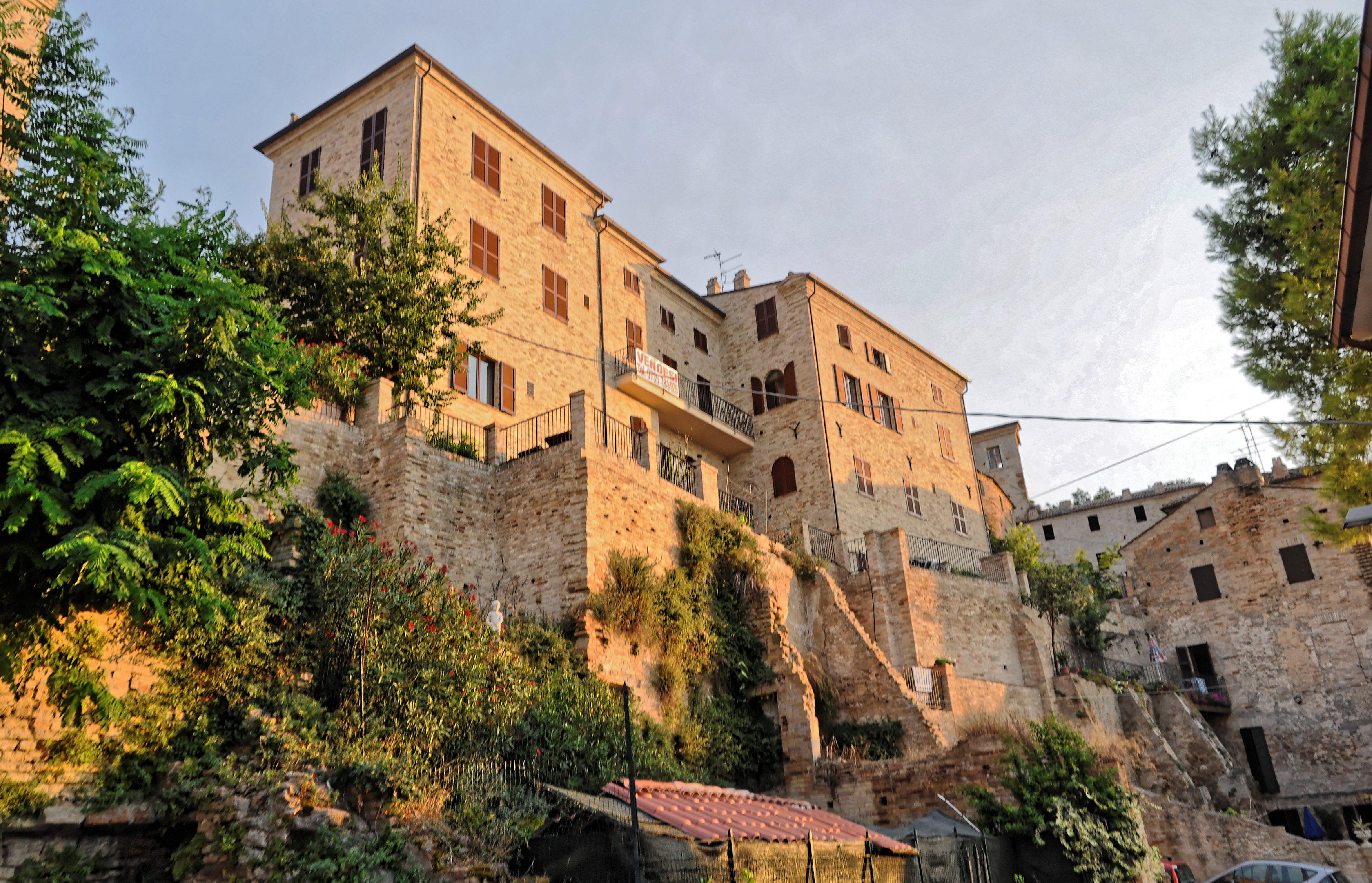 Cupra Marittima 2013